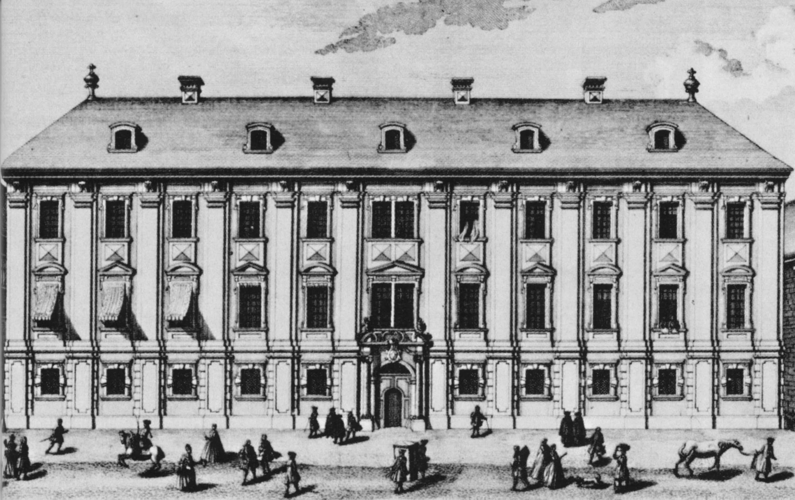 The Esterházy Palace on Vienna's Wallnerstraße